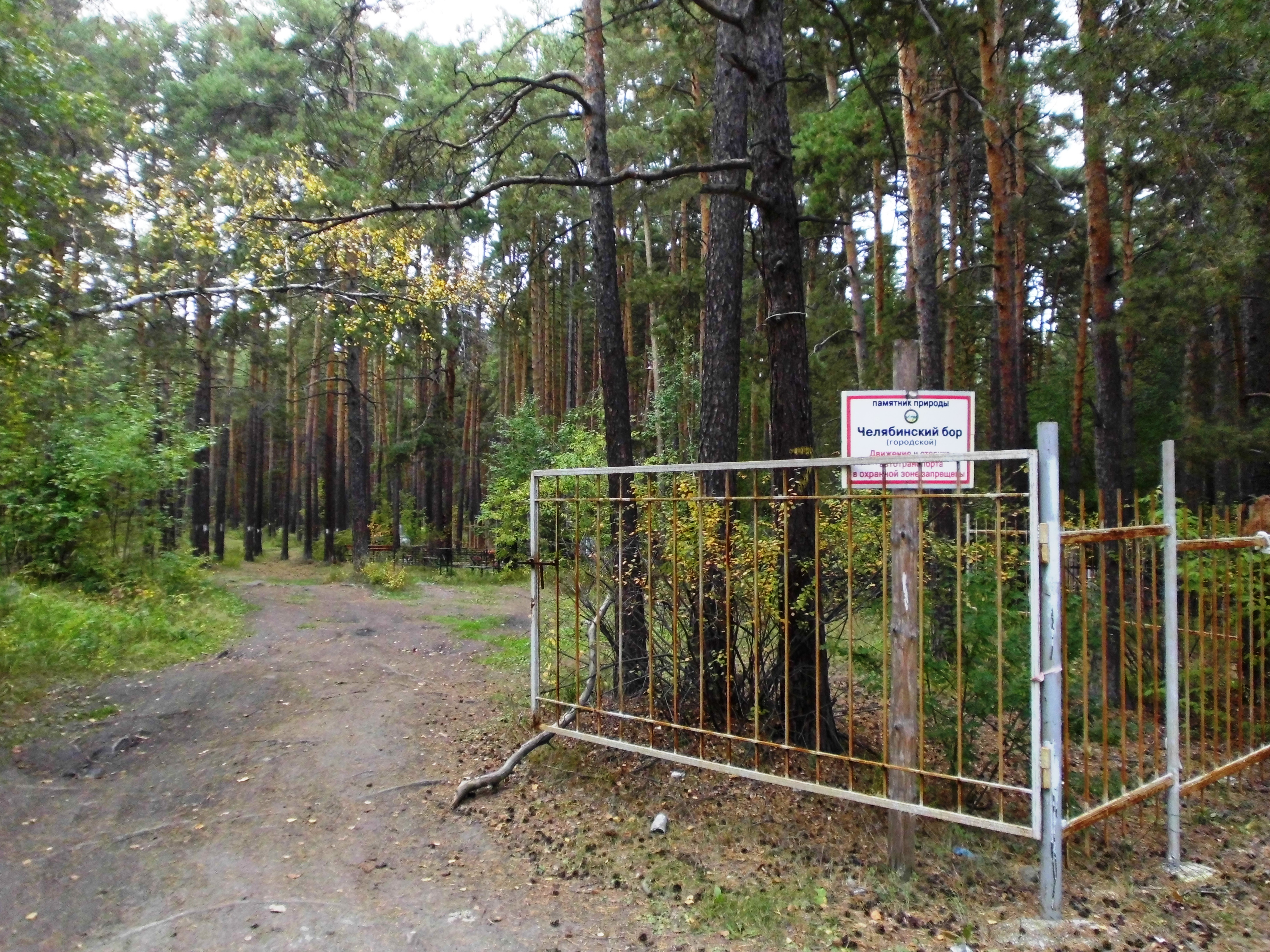 Могилы кладбища "пролезли" через ограду охраняемой природной территории - на территорию Городского соснового бора. Вид с территории кладбища, за оградой тоже могилы, часть ограды справа от ворот снесена.